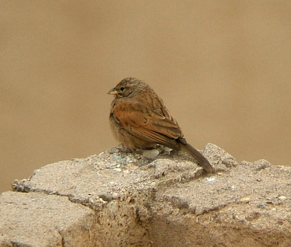 Emberiza sahari (syn. E. striolata race sahari), juvenile, Taroudant, Morocco, 18 April 2006